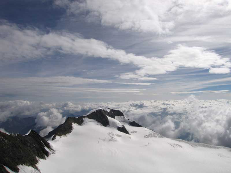 Bellavista von Piz Zupo aus